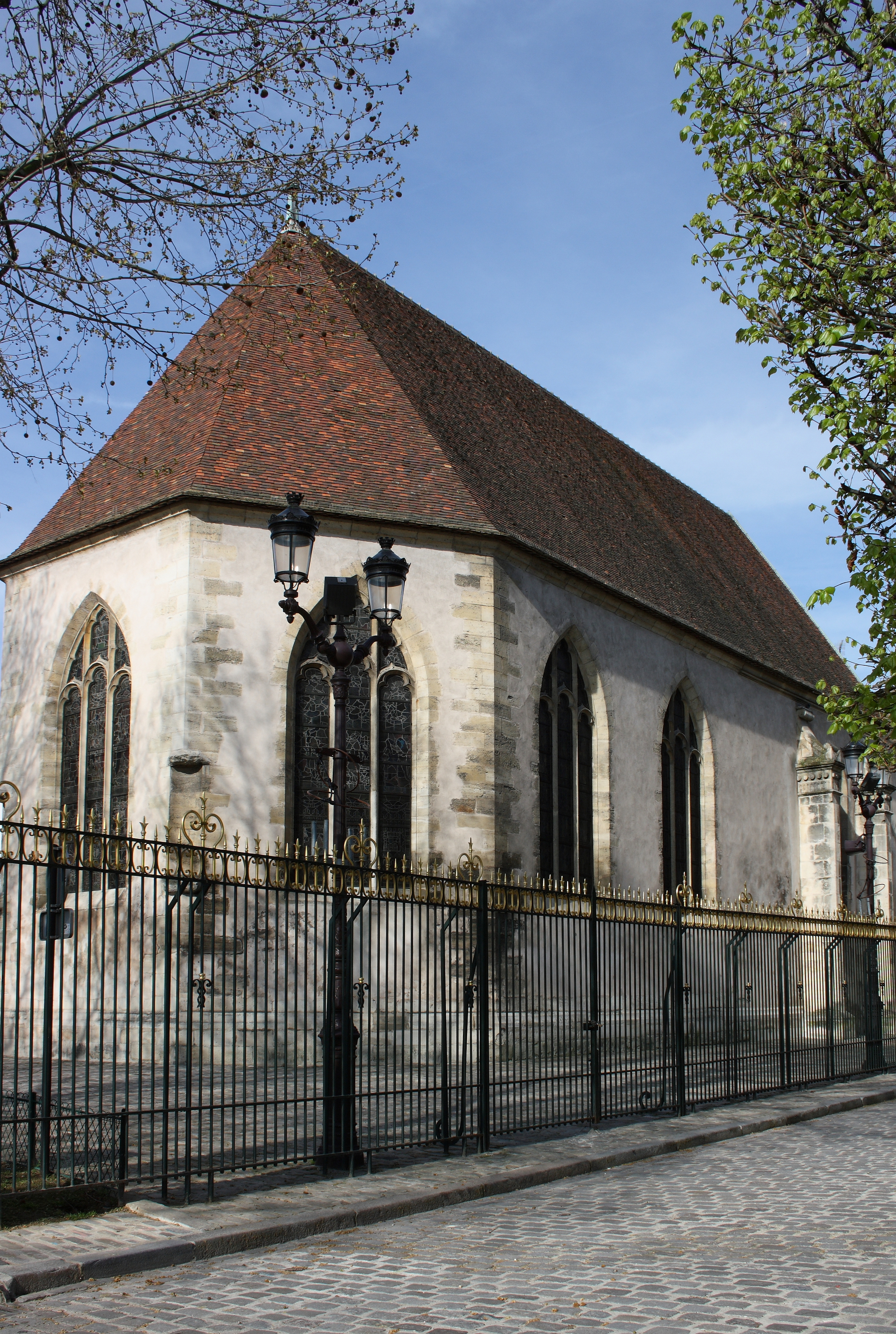 Katholische Kirche Notre-Dame-de-Pitié (Vieille Église) in Puteyáux, einer Gemeinde im Département Hauts-de-Seine (Île-de-France), aus dem 16. Jahrhundert, Blick auf die Apsis